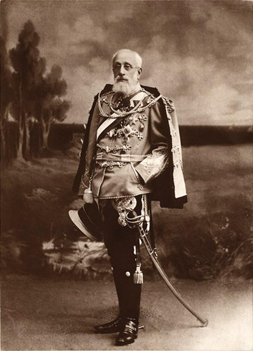 Александр Александрович Пушкин, генерал-лейтенант, сын поэта Александра Сергеевича Пушкина